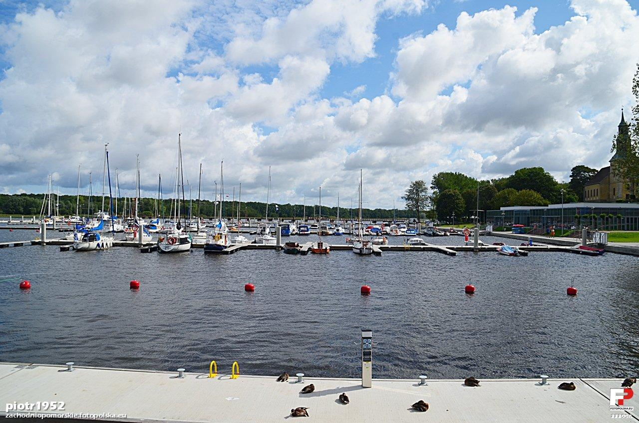 Przystań - po przebudowie